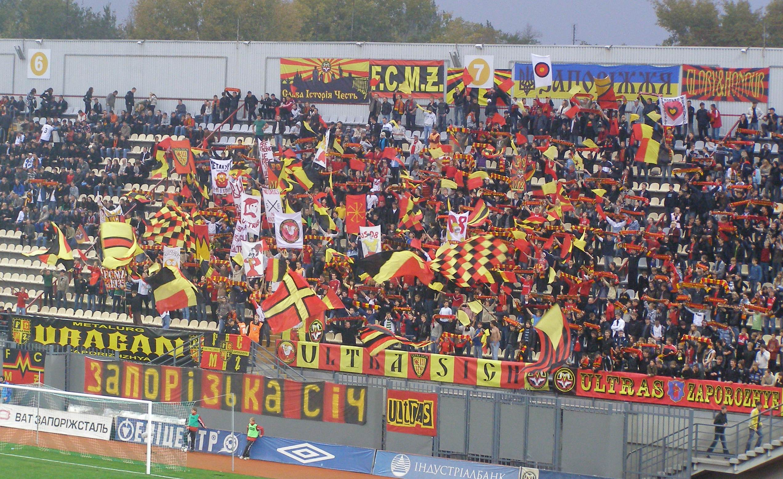 Ultras des Metalurg Saporischschja